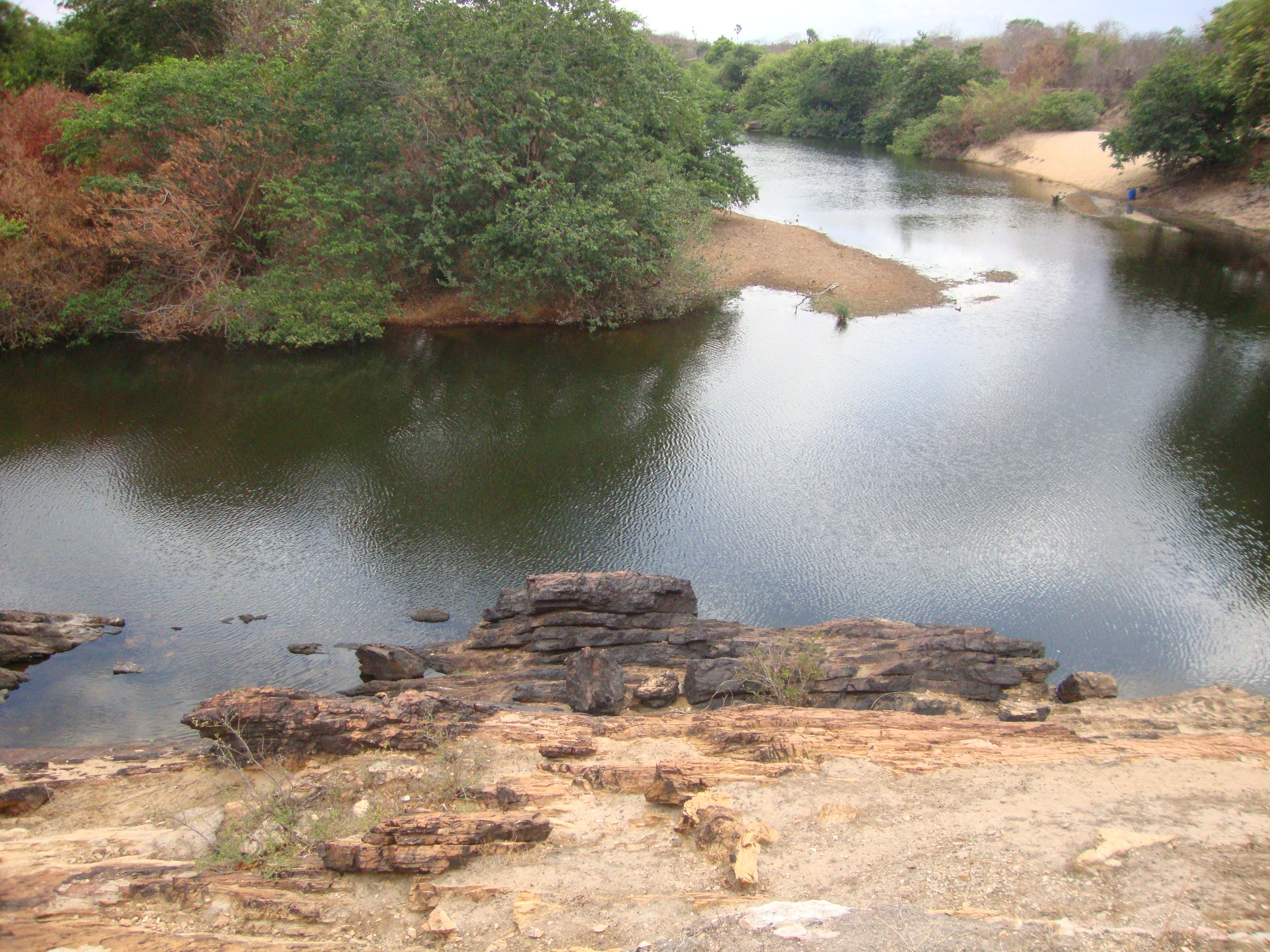 Leito do rio